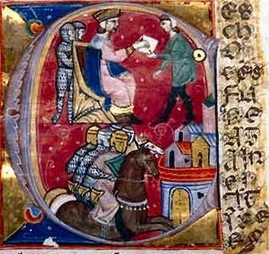 Hugo skláda vazalskou přísahu